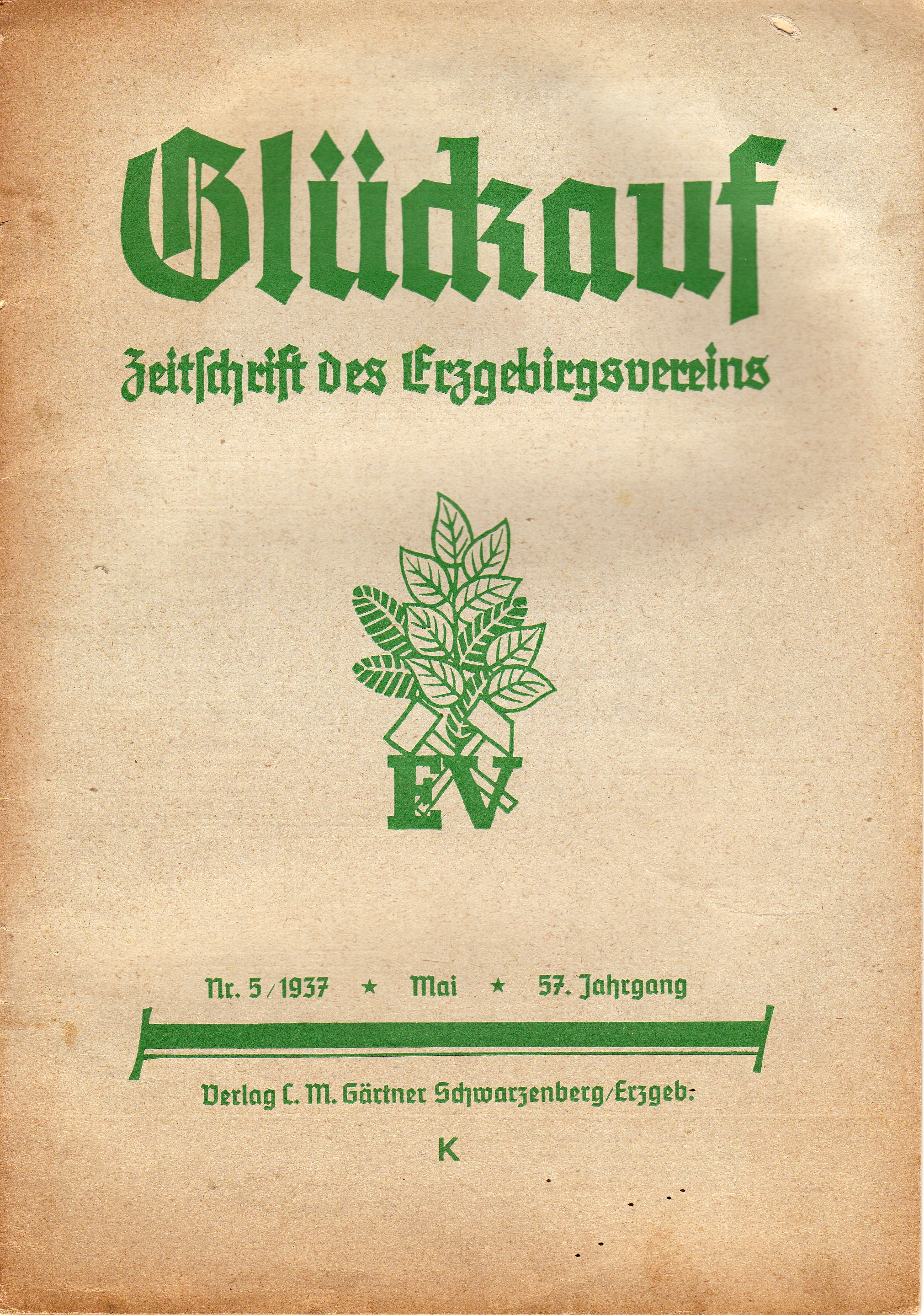 Heft 5 – Mai – des Jahrgangs 1937, der 57. Jahrgang der Zeitschrift „Glück auf“ des Erzgebirgsvereins. Format: 17,3 Zentimeter breit und 24, 6 Zentimeter hoch. Neben Mitteilungen des Vorstandes, in denen auch – nach Orten sortiert – neue Mitglieder aufgelistet werden, Übersichten über Veranstaltungen, Berichten aus den Zweigvereinen gibt es in dem 84 seitigen Heft auch Aufsätze: Ernst Flath, Schönheide im Erzgebirge, schreibt „Die Gründungsgeschichte Schönheides – Zur bevorstehenden Vierhundertjahrfeier des Ortes“. Georg A. Oedemann ist mit „Am Buchenberg“, Robert Jahn, Johanngeorgenstadt, mit „Georg Baumgarten – Ein Erzgebirger aus Johanngeorgenstadt als Vorläufer des Zeppelin“ , Richard Truckenbrodt, Johanngeorgenstadt, mit „Vorschlag zur Einrichtung einer Mundartecke im Glückauf“ und Rektor i. R. Teubner, Annaberg, mit „Emil Teubner, der große Bildschnitzer“ vertreten. E. Bauerwachs steuert das Gedicht „Wenn in Wallern draußen“ bei, und M. Günther, Annaberg, berichtet über die „Gründung der ‚Heimatbühne Sachsen‘“, die mit dem Volksstück aus dem Erzgebirge von Kanut Schäfer „Dr Staa“ (Der Stein) ihre erste Premiere hatte. Mit sechs Seiten ist der mit drei Fotos des Autors bebilderte Aufsatz Ernst Flaths der zentrale Artikel dieses Heftes.